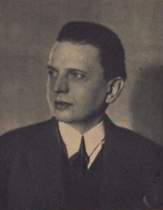 Milan Svoboda (1883-1948), český divadelní režisér, pedagog a překladatel